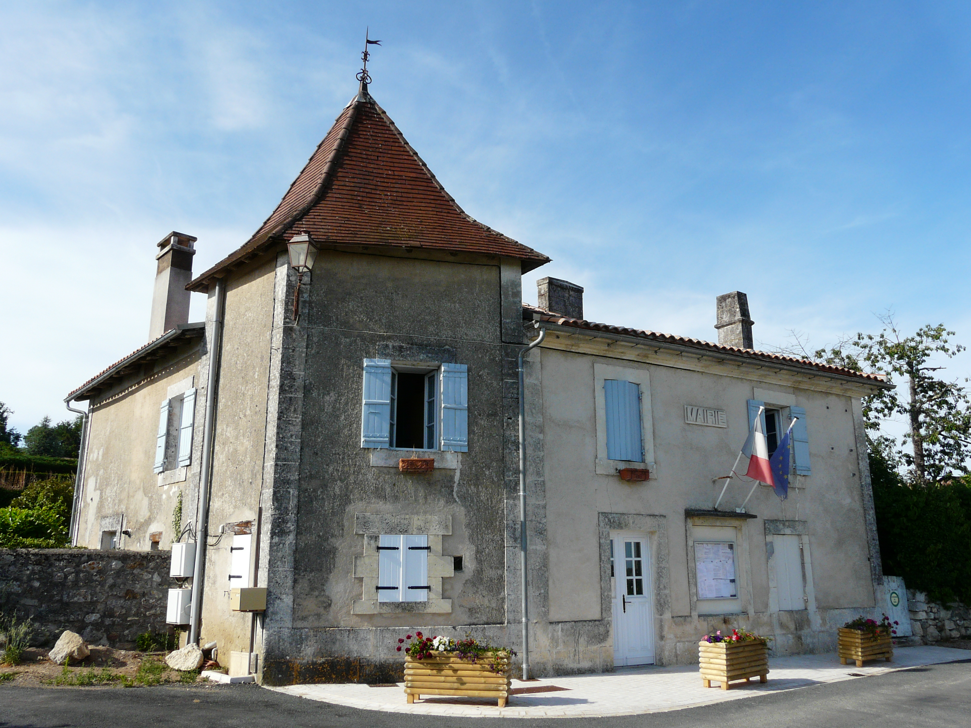 La mairie de Saint-Félix-de-Bourdeilles, Dordogne, France.